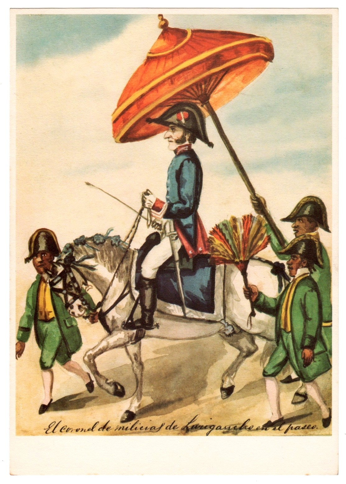 Acuarela de Pancho Fierro (Lima, 1807 - Lima, 1879)